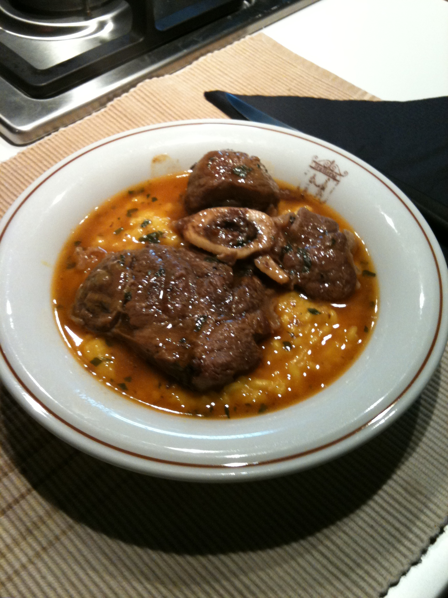 Risotto alla milanese con ossobuco di vitello piemontese